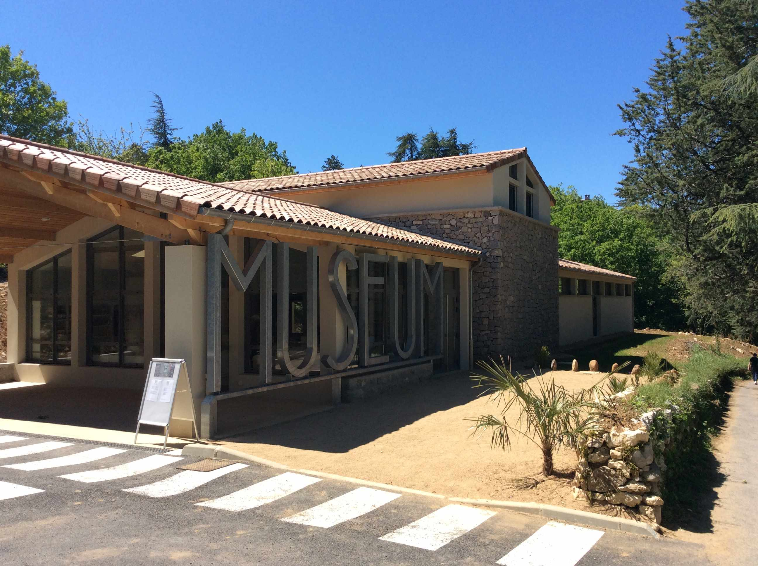 Vue avant du Muséum de l'Ardèche